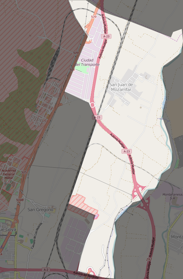 Mapa del distrito de San Juan de Mozarrifar en Zaragoza.